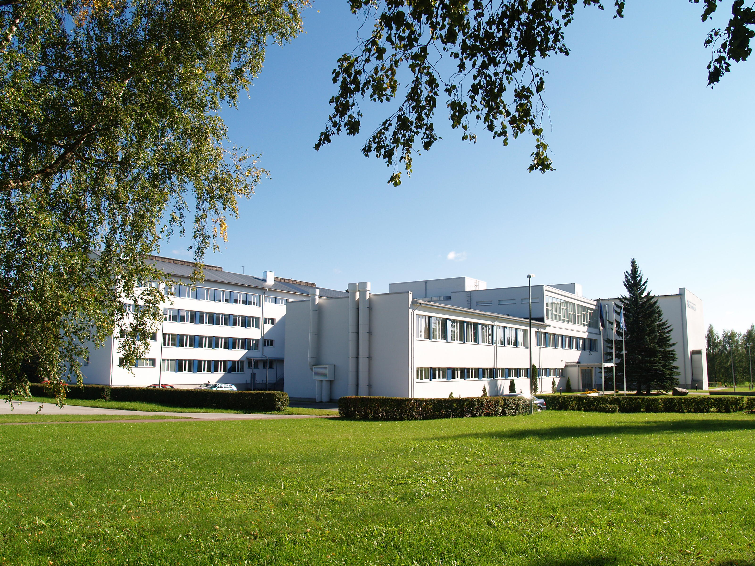 Carl Robert Jakobsoni nimeline Gümnaasium Viljandis.